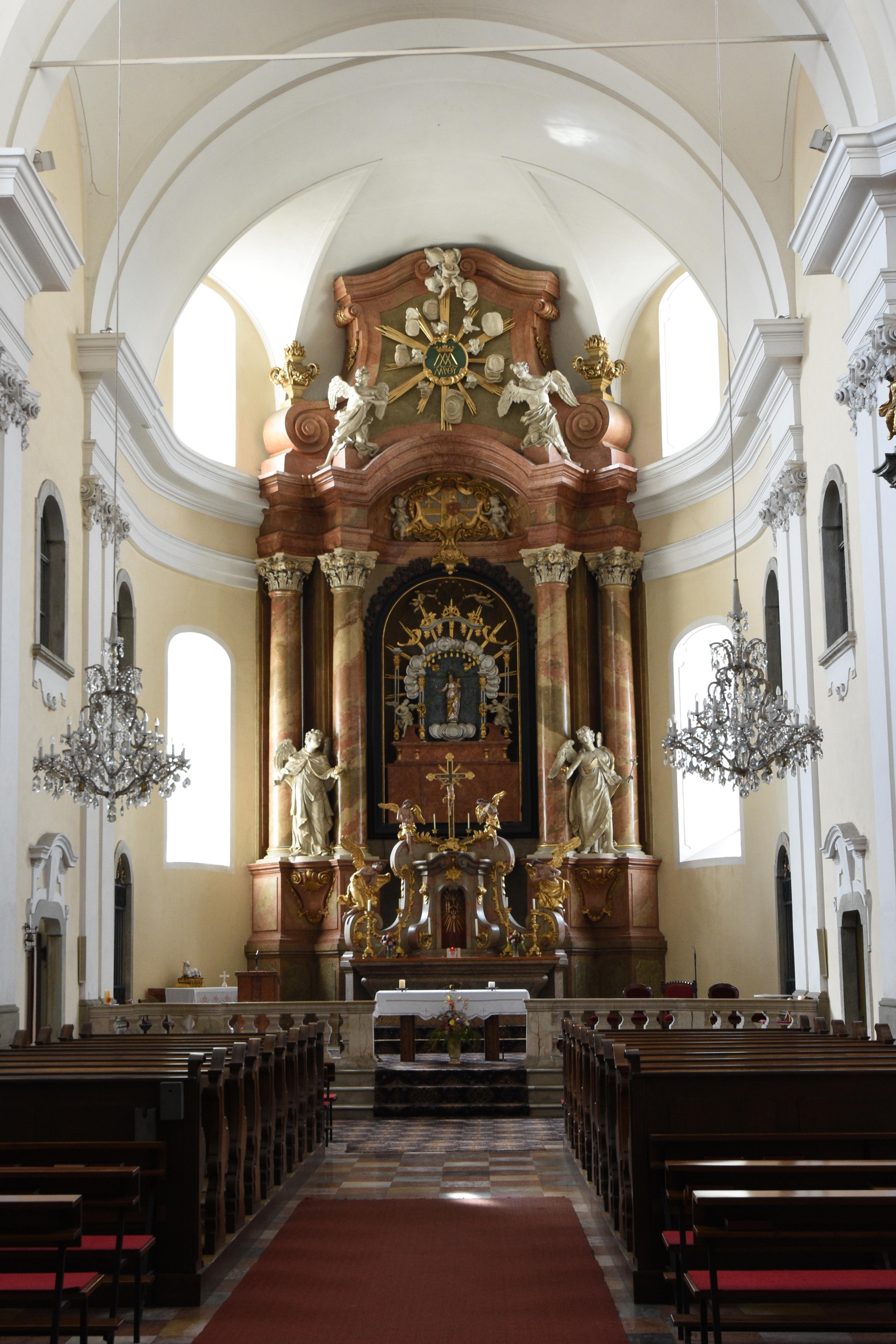 Mariä Reinigung, Gleisdorf - Interior